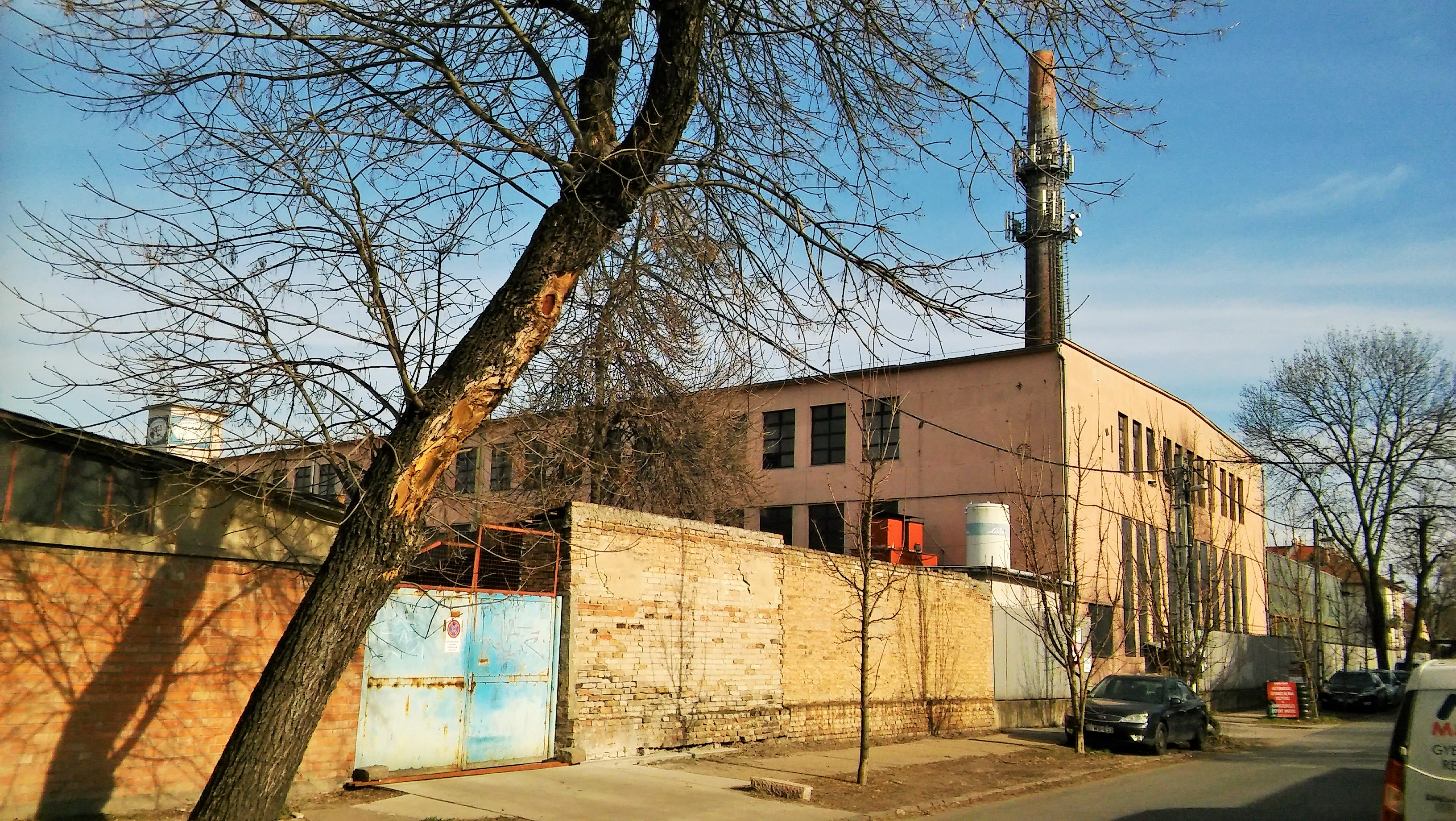 Alumíniumárugyár Zrt., Budapest, Erzsébet királyné útja 57, 1142